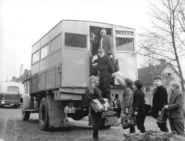 Ivenack, Schülertransfer zur Schule Zentralbild Krisch 8.12.1960 Schulerweiterungsbau im NAW In der Landgemeinde Ivenack, Kreis Malchin, reichen die alten Schulräume nicht mehr aus. Ein Anbau machte sich notwendig und die ganze Gemeinde half den Plan zu verwirklichen. Die gesamte Bevölkerung, voran der Schulleiter mit seinem Lehrerkollegium, rodeten die Bäume, schateten die Fundamente und füllten Erde auf, wo es notwendig war. Ca. 20 - 21 000.- DM wurde im NAW erarbeitet. Sechs neue Klassenräume können nächstes Jahr in Betrieb genommen werden. Ausserdem wird ab l.IX. 1961 das Schulprogramm in der Schule und eine Klassenstufe erweitert. Zur Zeit unterrichten in der Schule 11 Lehrer, 1 Pionierleiter und 2 Hortnerinnen. UBz: Täglich werden die Kinder aus den Nachbargemeinden mit MTS-Fahrzeugen und Autobussen zur Schule nach Hause gefahren.